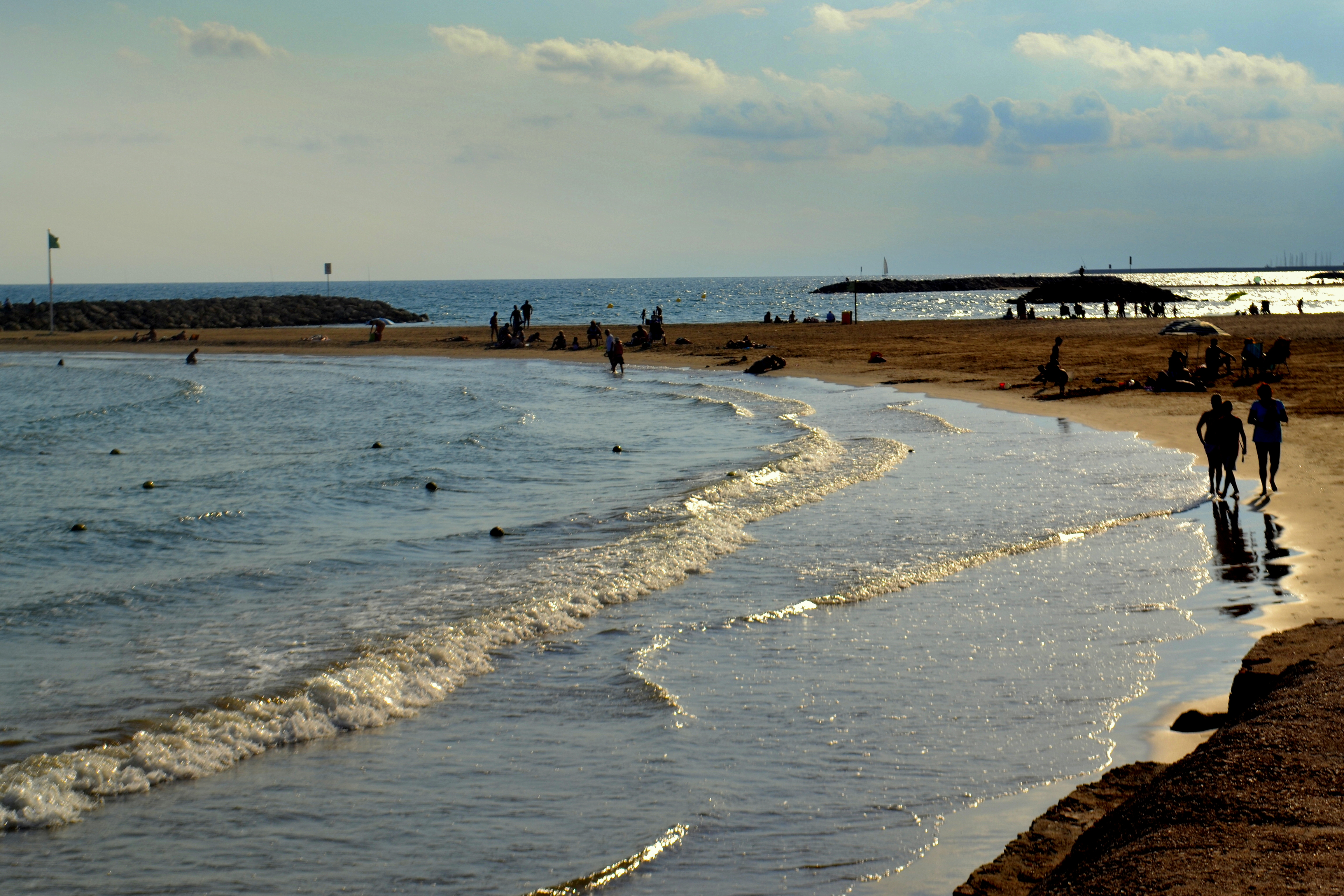 Platja de Cunit This is a a photo of a beach in Catalonia, Spain, with id: PL-CT-17003-120